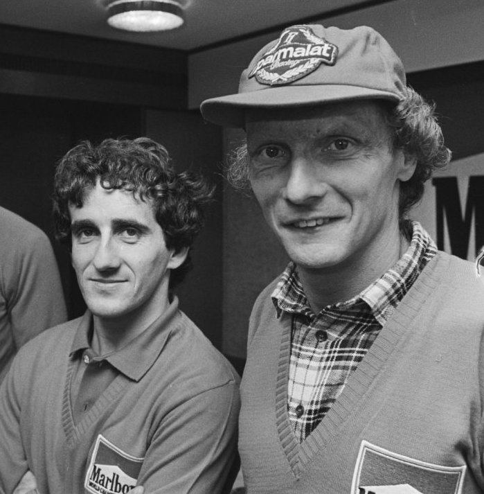 Persconferentie autocoureurs Lauda en Prost op Schiphol in behalen van resp. 1e en 2e plaats in WK Formule 1 door het Marlboro/Mclarenteam